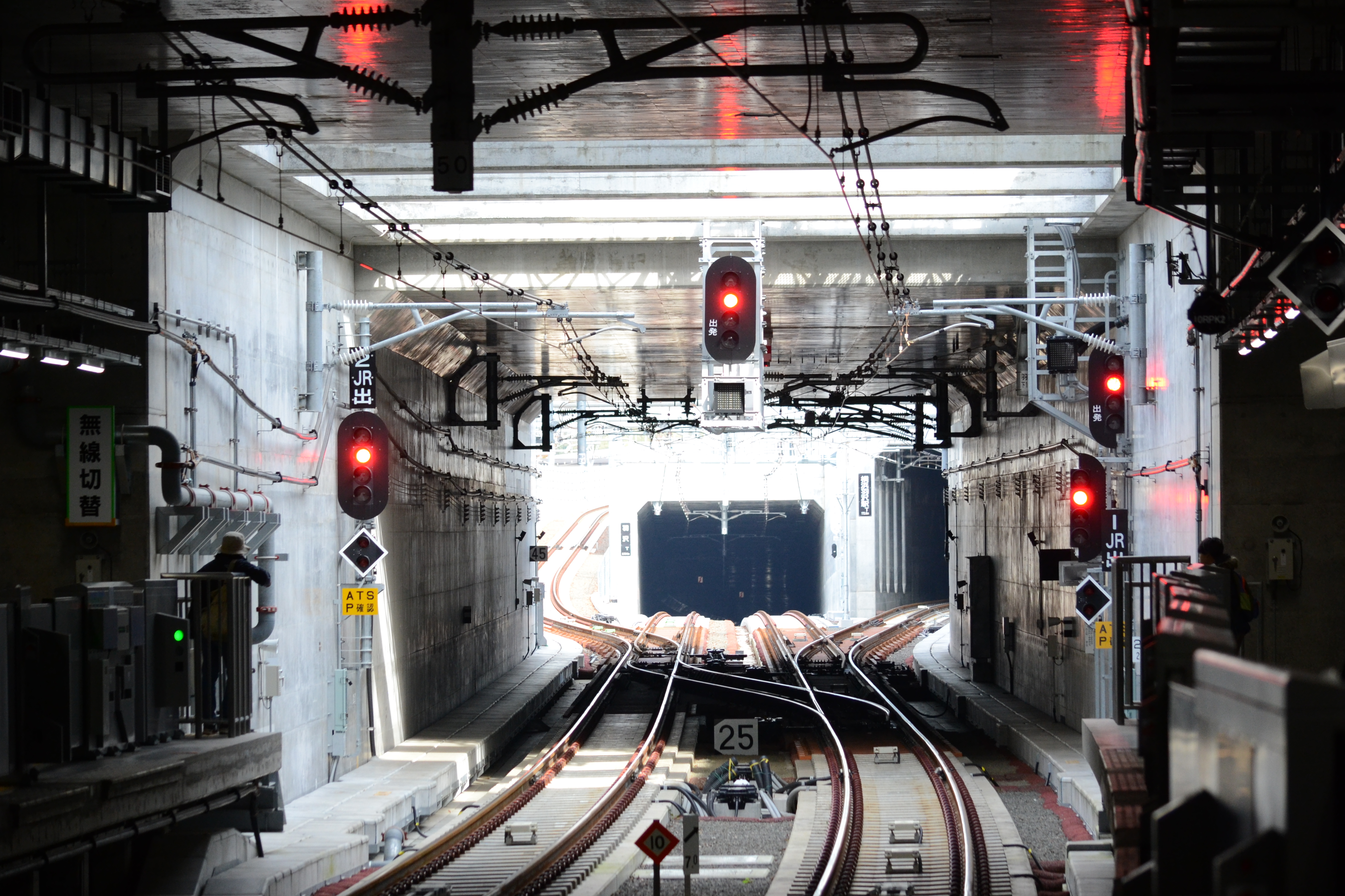 羽沢横浜国大駅の東京方面の構内